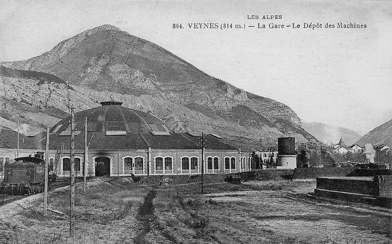 Le dépôt de locomotives de Veynes : la rotonde et un château d'eau.